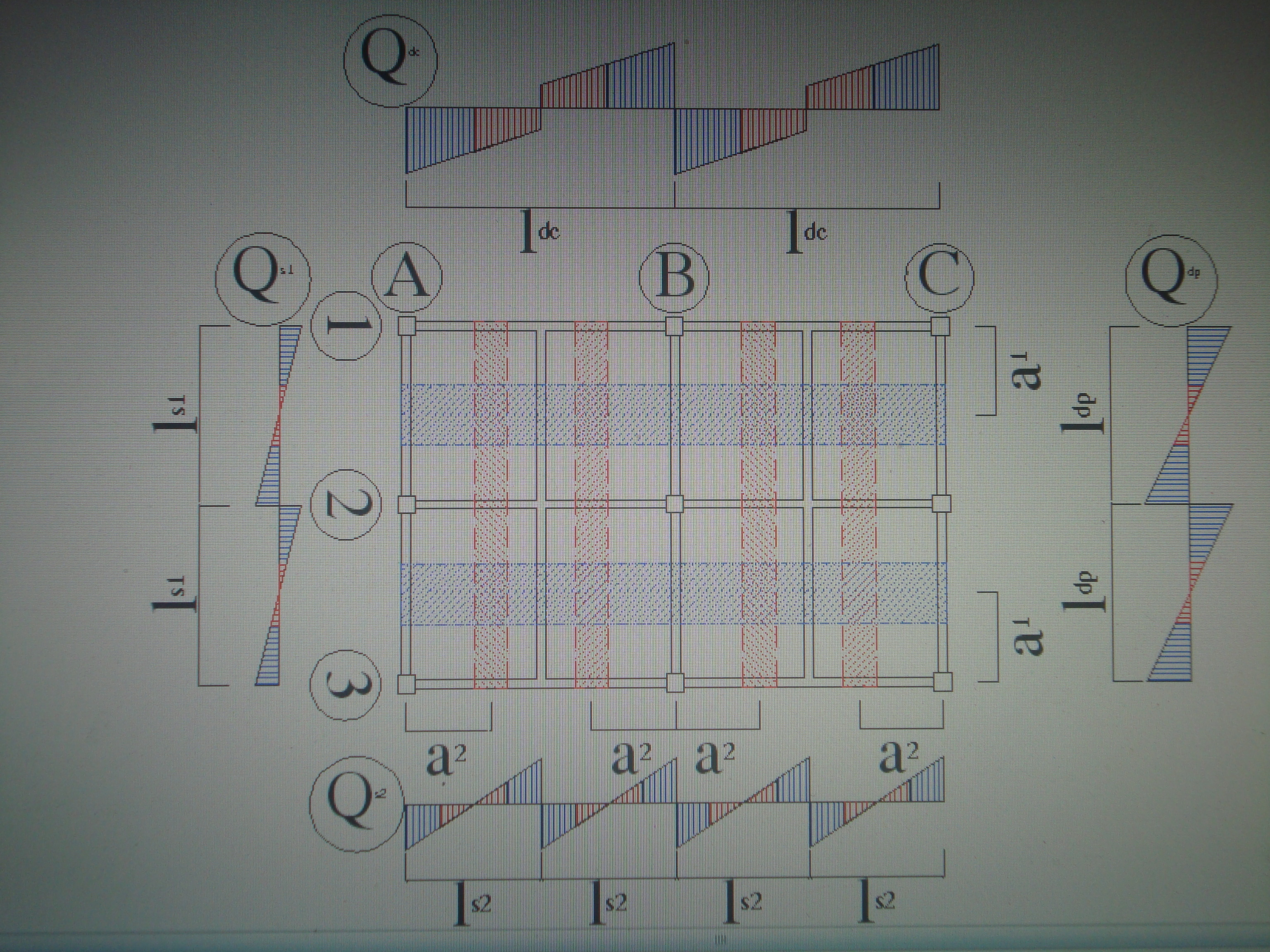 Vị trí có thể bố trí mạch ngừng thẳng đứng trong thi công kết cấu sàn sườn toàn khối. Vùng gạch đỏ là vùng có thể bố trí được mạch ngừng cắt qua bản và dầm chính. Vùng gạch xanh là vùng có thể bố trí được mạch ngừng cắt qua bản và dầm phụ.